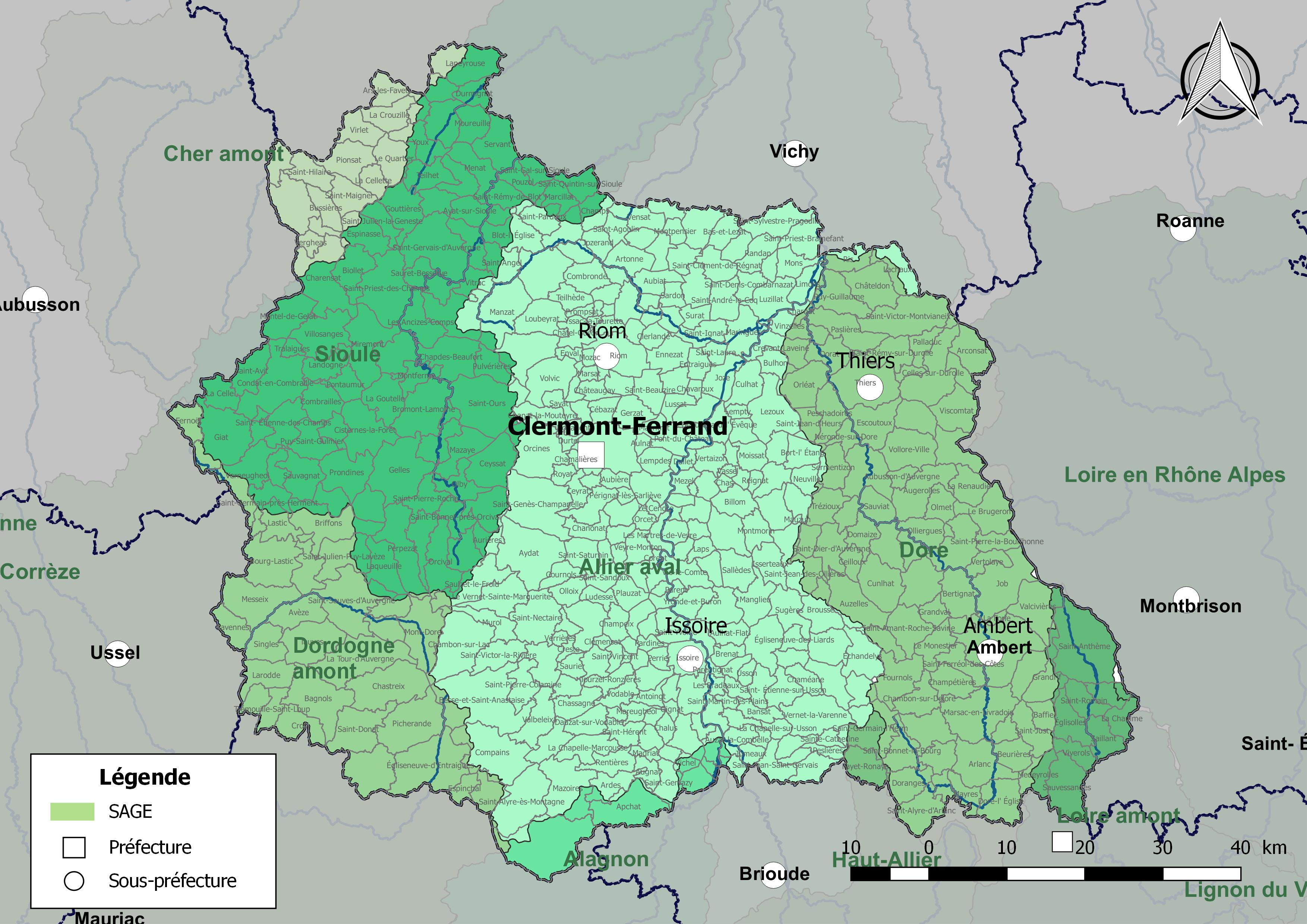 Carte des schémas d'aménagement et de gestion des eaux (SAGE) concernant le département du Puy-de-Dôme (France) au 1er janvier 2018.